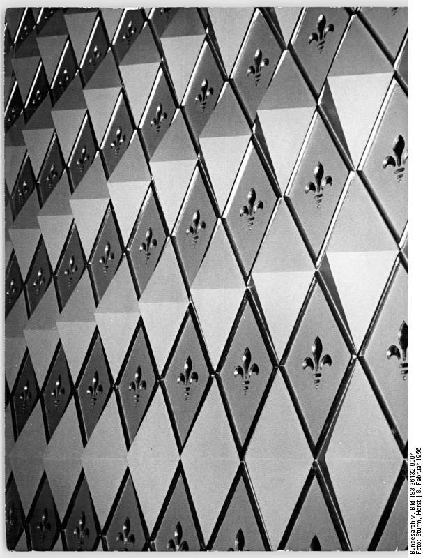 Berlin, Nalepastraße, Sendeanstalt, Konzertsaal, Wandverkleidung Zentralbild Sturm 8.2.56 Neuer moderner Komplex für die künstelerische Produktion im Funkhaus Berlin Der am 16. Februar 1955 durch Brandstiftung zerstörte große Sendesaal des Staatlichen Rundfunkkomitees Berlin, Nalepastrasse, ist nach modernsten Gesichtspunkten wiederaufgebaut worden. Daneben wurden einige kleinere Sendesäle eingerichtet. Zu jedem Sendesaal gehört ein Regieraum. Am 8.2.56 fand im Funkhaus eine Pressekonferenz statt mit anschliessender Besichtigung der neuen Räume durch die Pressevertreter. UBz: Eine Wandfläche im Konzertsaal. Die Räume sind alle nach Grundsätzen der geometrischen Raumakustik so gestaltet, dass sie eine möglichst gute diffuse Schallfeldverteilung ergeben.